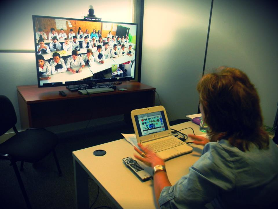 Primera clase de Ceibal en Inglés